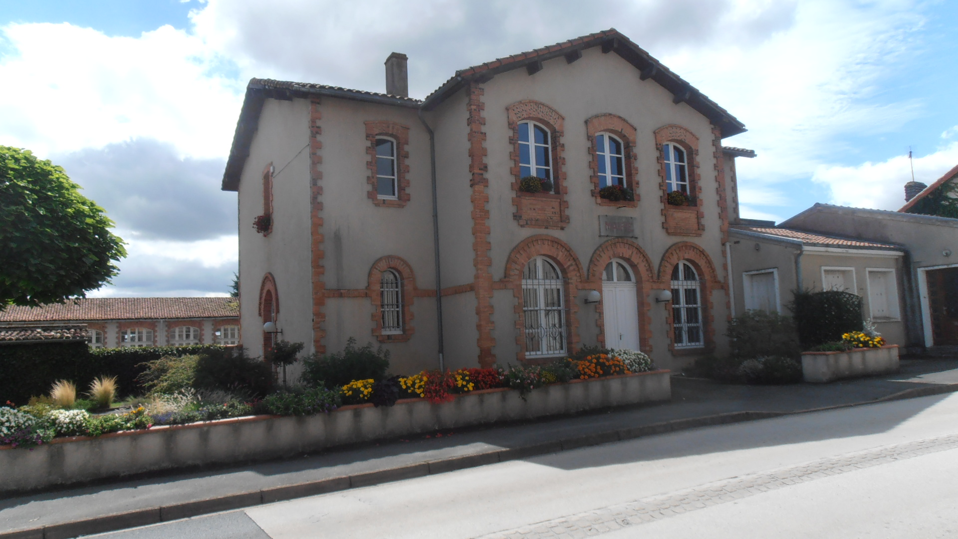 La mairie du Fuilet (Maine-et-Loire, France).